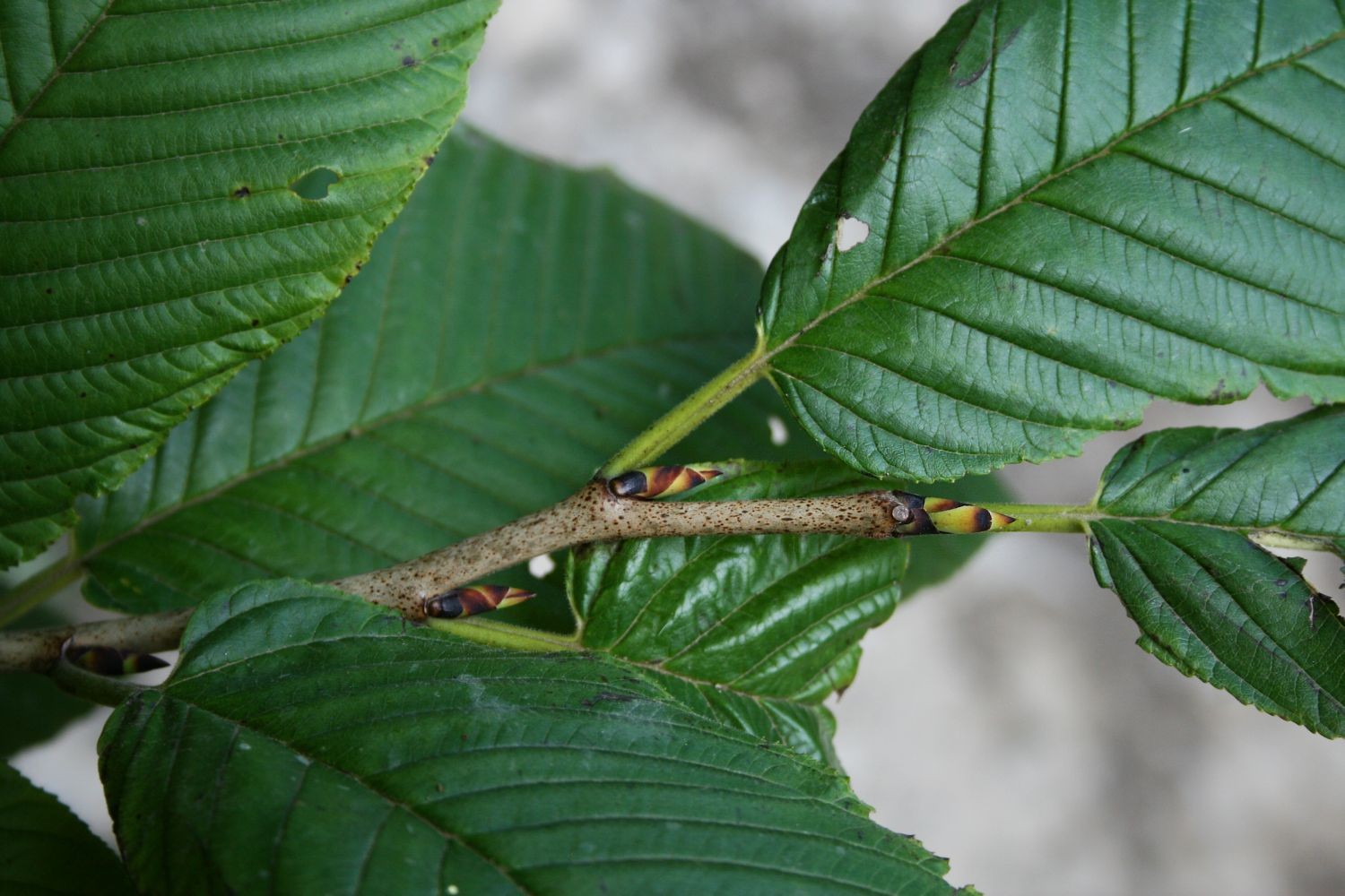 Rhamnus imeretina, Kreuzdorngewächse (Rhamnaceae) – Georgien/საქართველო: Kleiner Kaukasus, ca. 3,5 km SE Akhaldaba/ახალდაბა, ca. 870 m s.m.